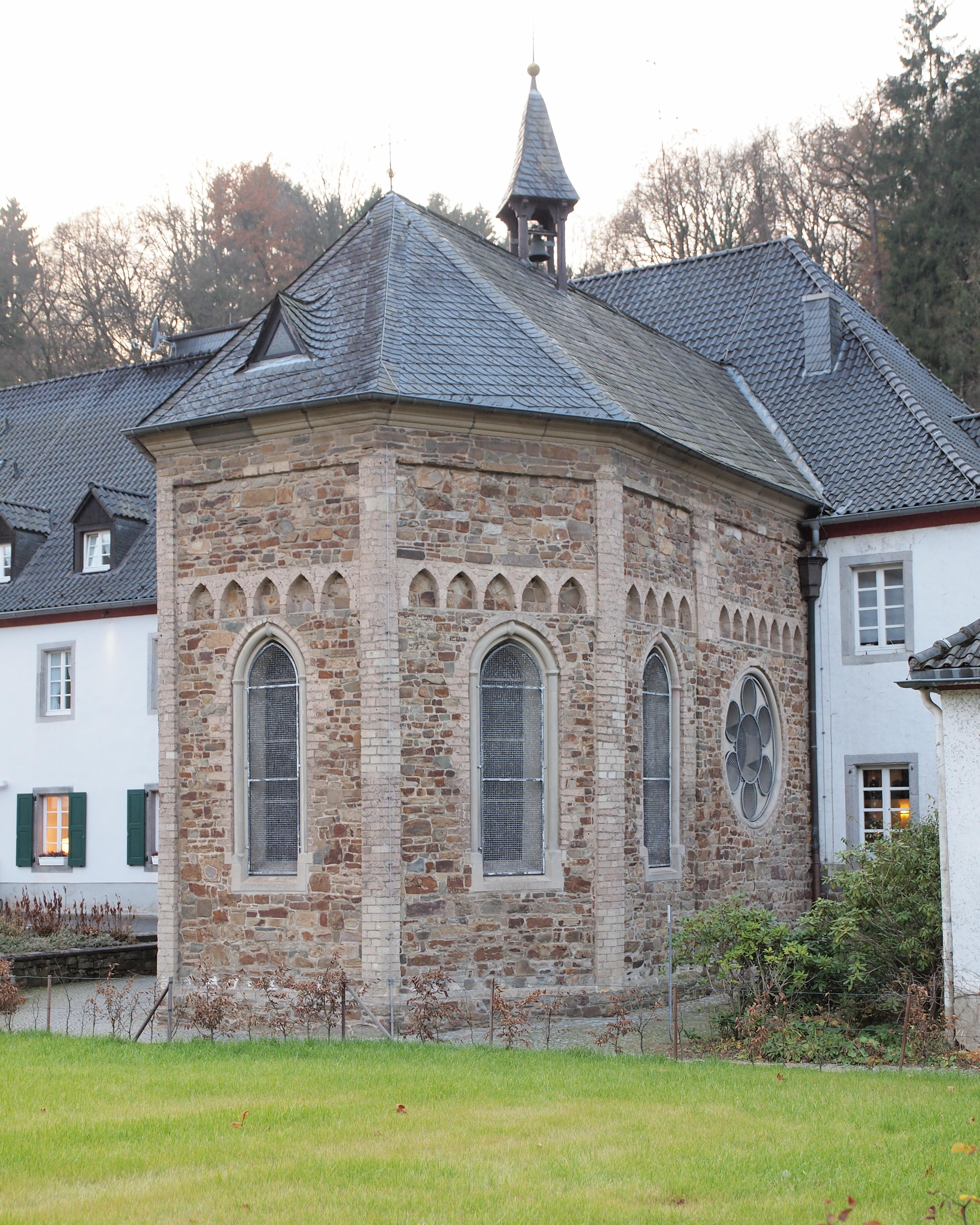 Altenberger Dom, Markuskapelle, mit dem Wikipediastammtisch Wuppertal im Altenberger Dom